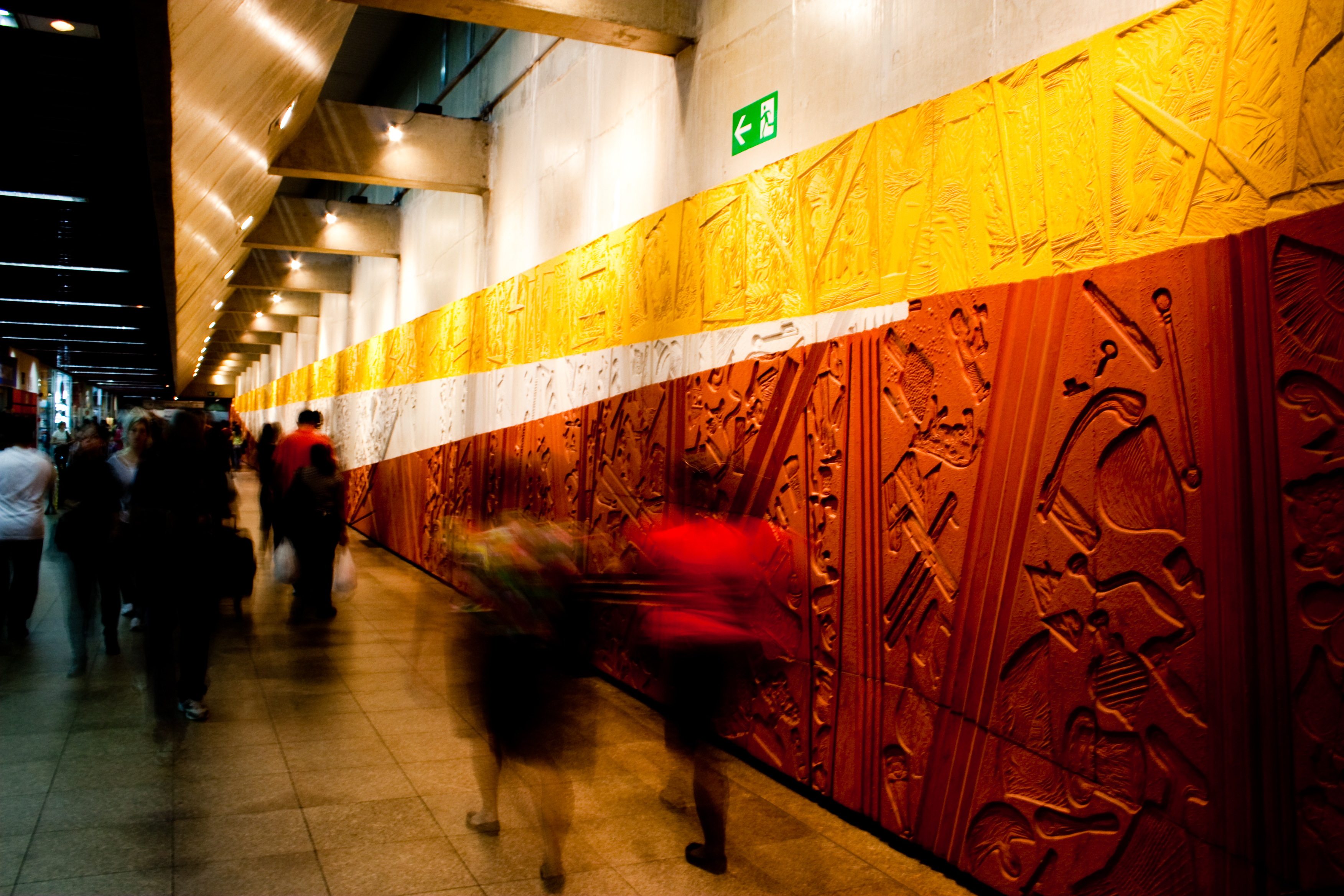 Estação de Metrô Luz - Caminho de acesso à estação de metrô. Foto por André Deak para o Arte Fora do Museu (